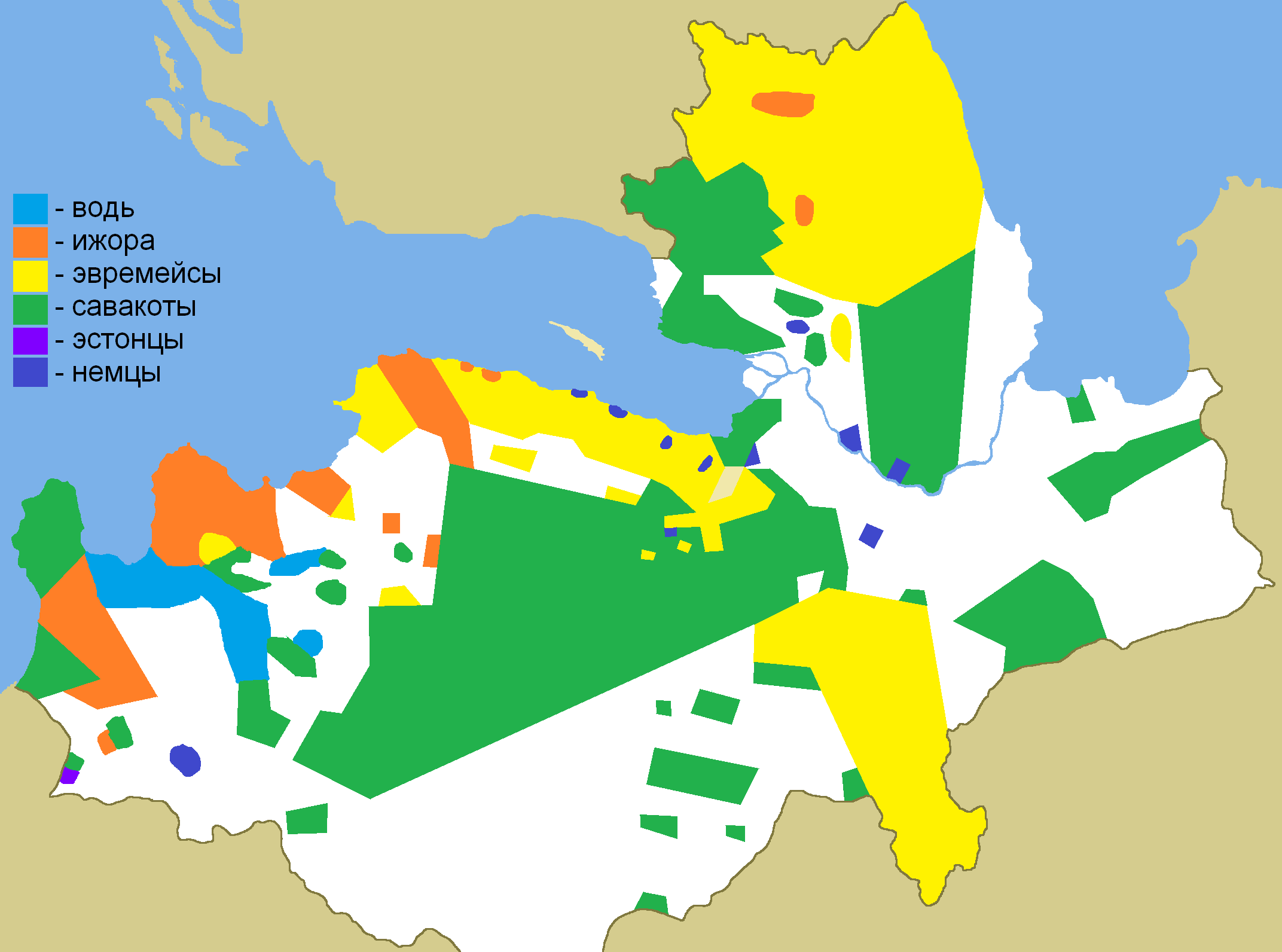 Этнографическая карта Ингерманландии. 1849 г. (Сделана на основе этнографической карты Санкт-Петербургской губернии П. И. Кёппена. 1849 г.